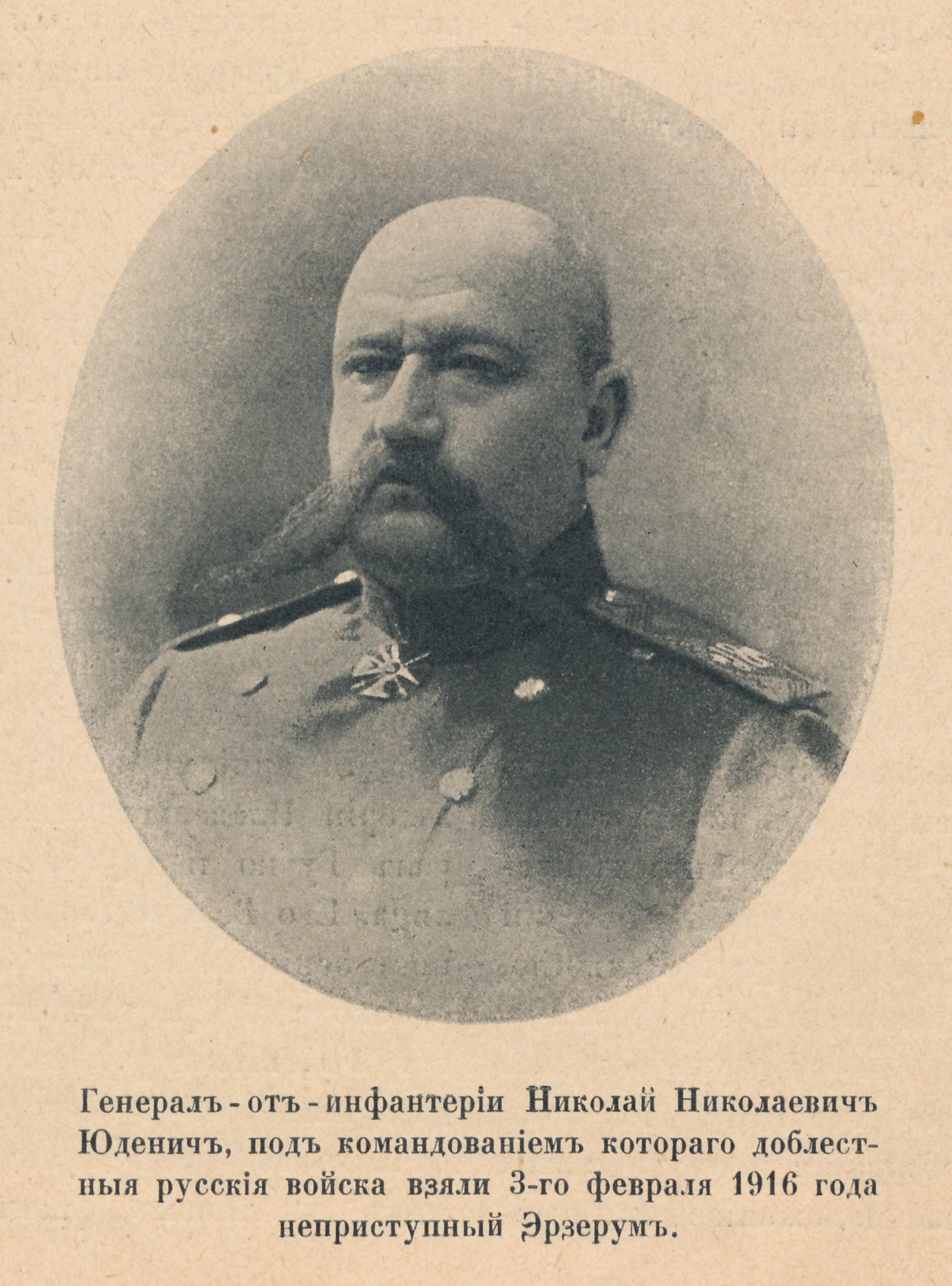 Фото Н.Н. Юденича в журнале "Летопись войны", 1916, № 78, с. 1243.